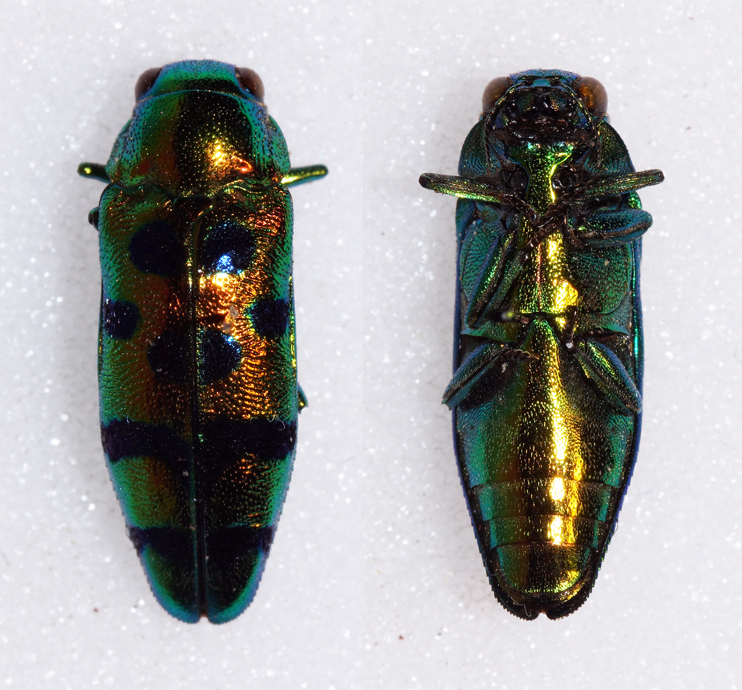 Bellamy,1991 Sex: ? Data: 08-2014 - Hinabangan - Samar - Central Visayas - Philippines Size: 15mm